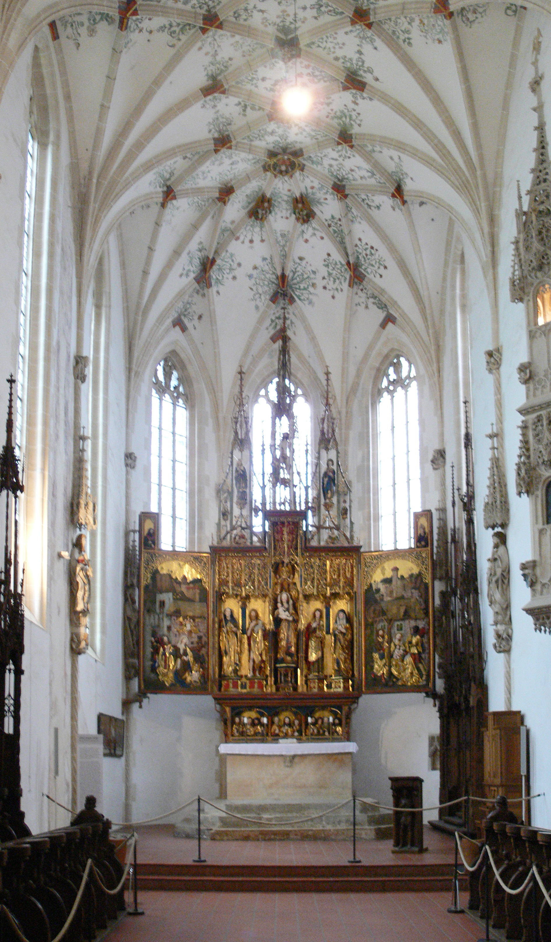 Kloster Blaubeuren, Klosterkirche, Chorraum mit Hochaltar